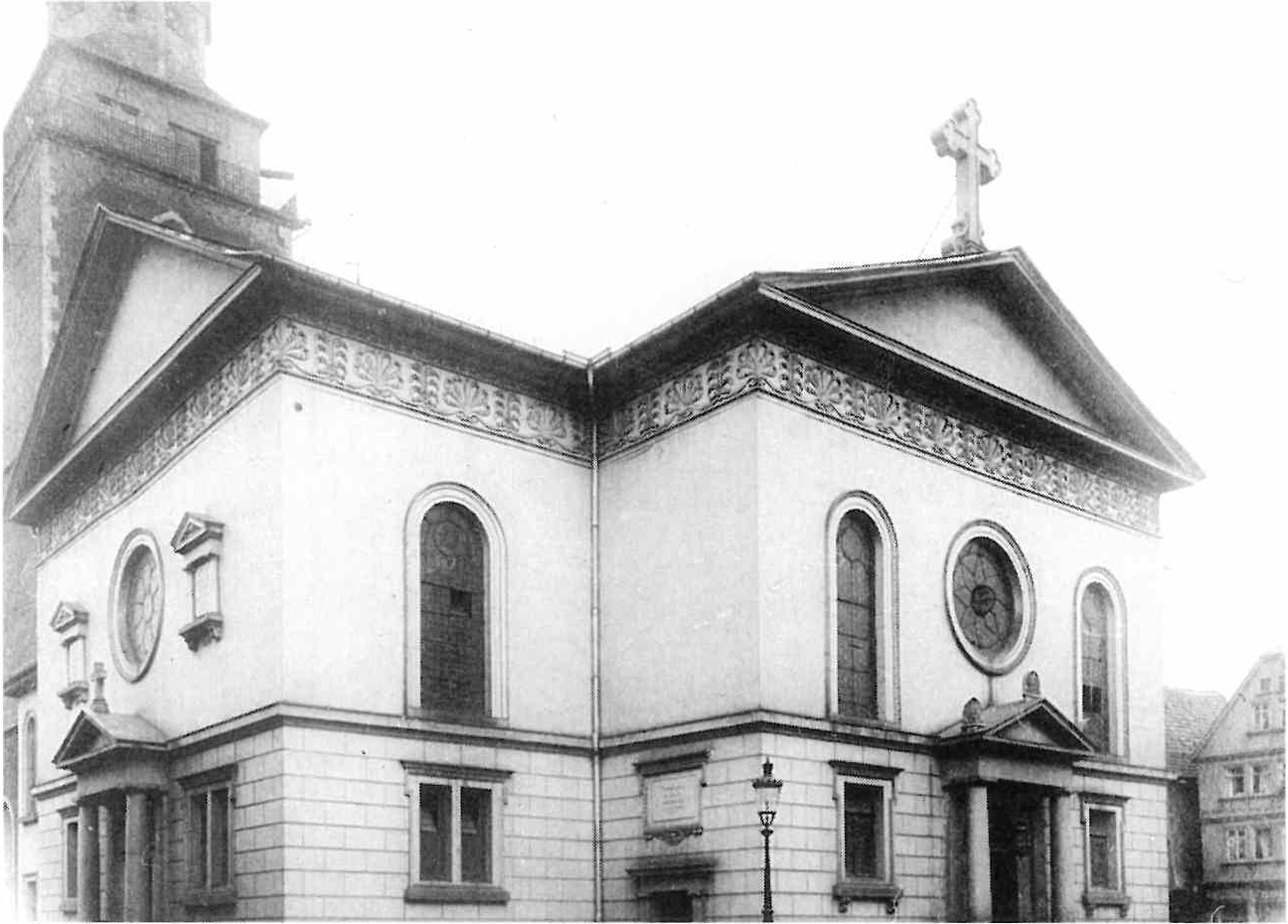 Fotografie der Stadtkirche Gießen, Hessen, Deutschland